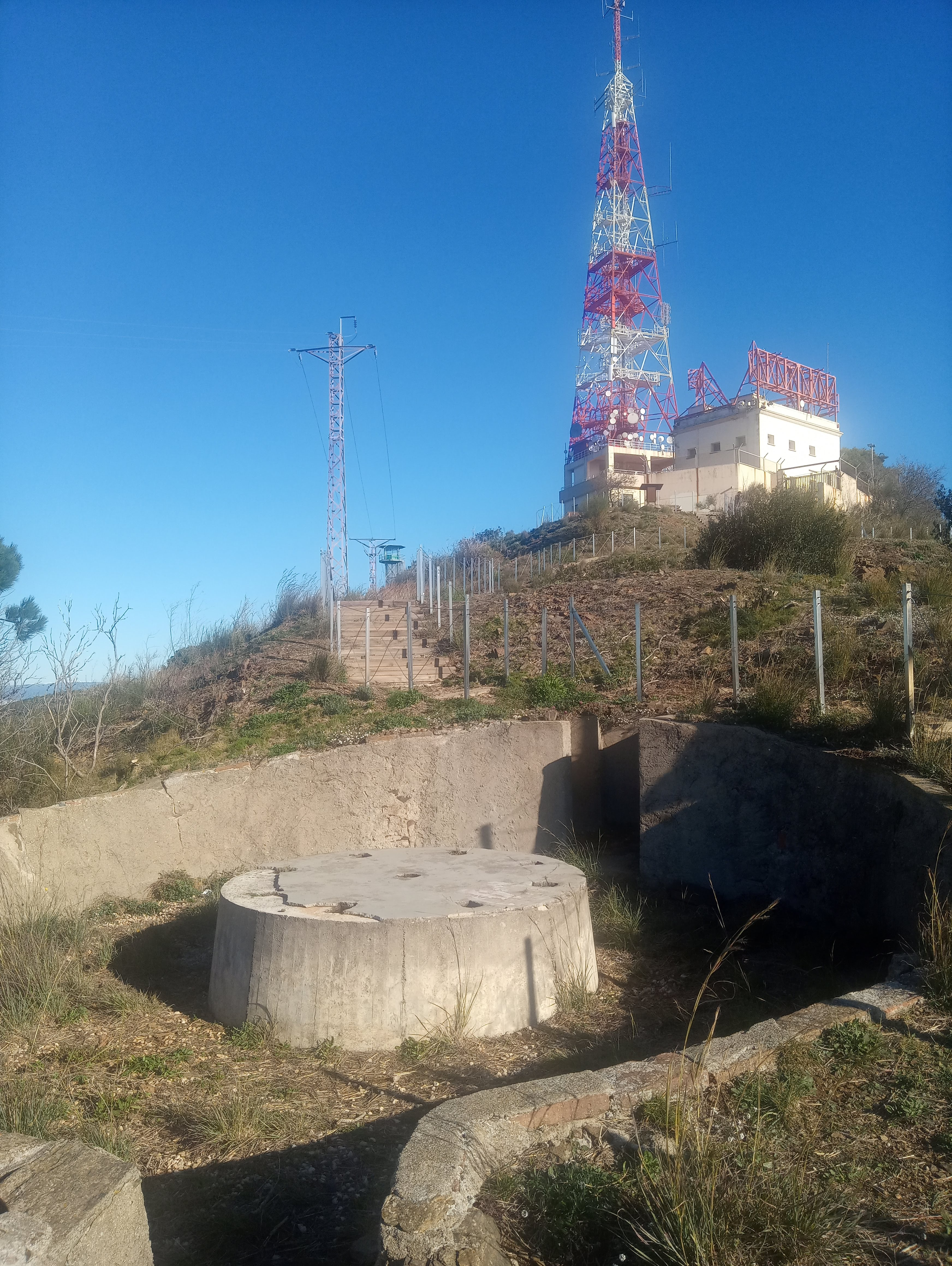 Zona de la Bateria Antiaerea